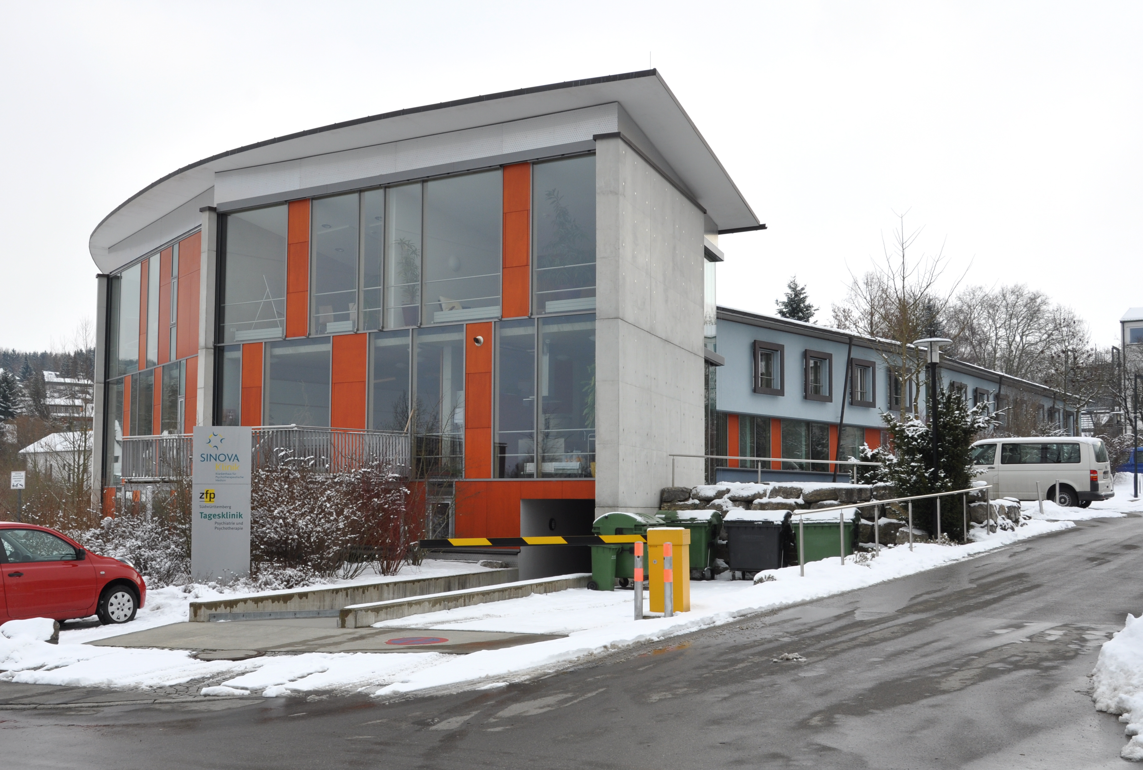 Ravensburg, Sinova-Klinik und ZfP-Tagesklinik